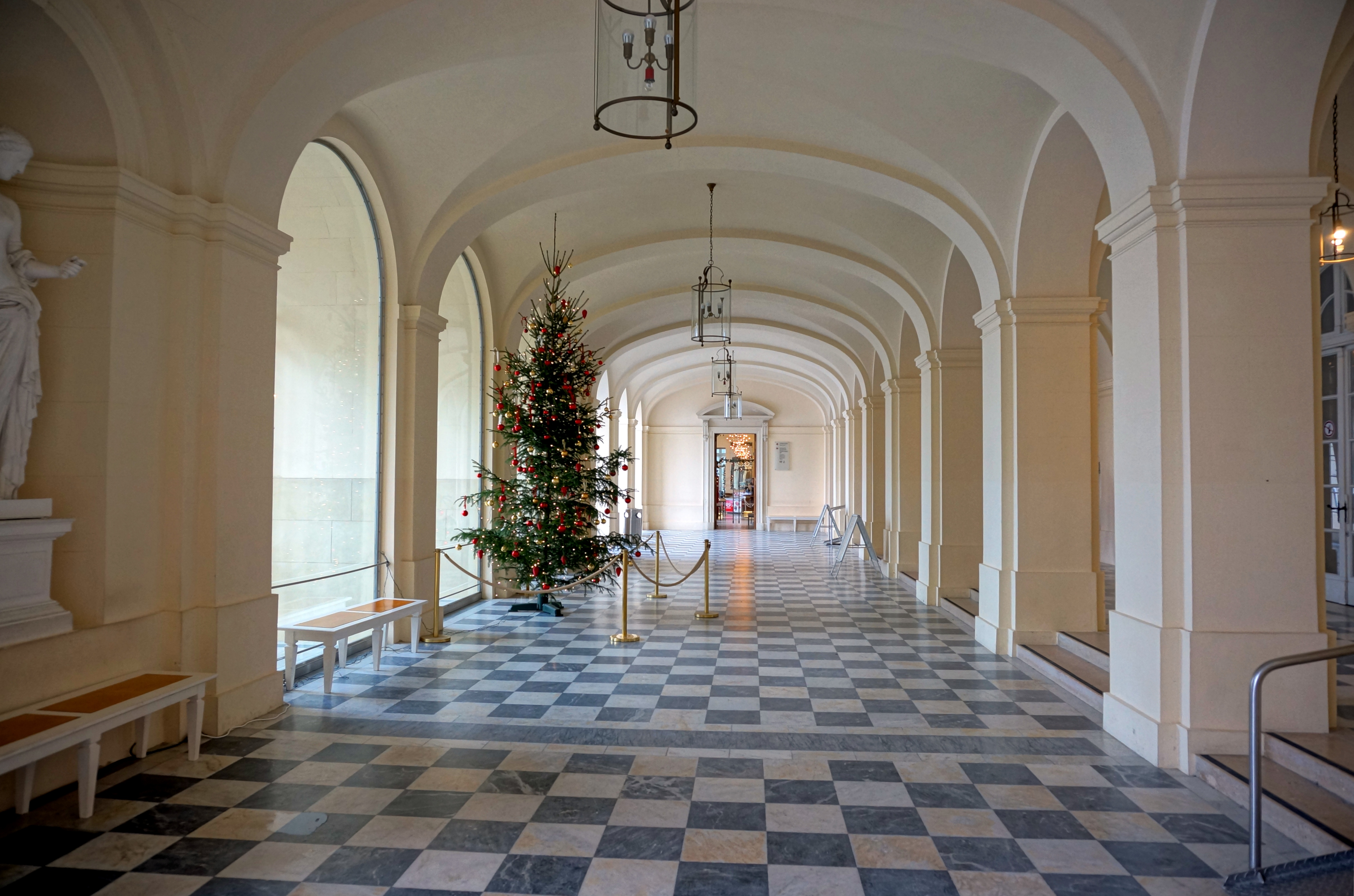 Deutschland, Bayern, Oberbayern, Landkreis Rosenheim, Gemeinde Chiemsee, Herreninsel, Neues Schloss Herrenchiemsee, Eingangshalle Mitte Dezember, Blick zum Cafe